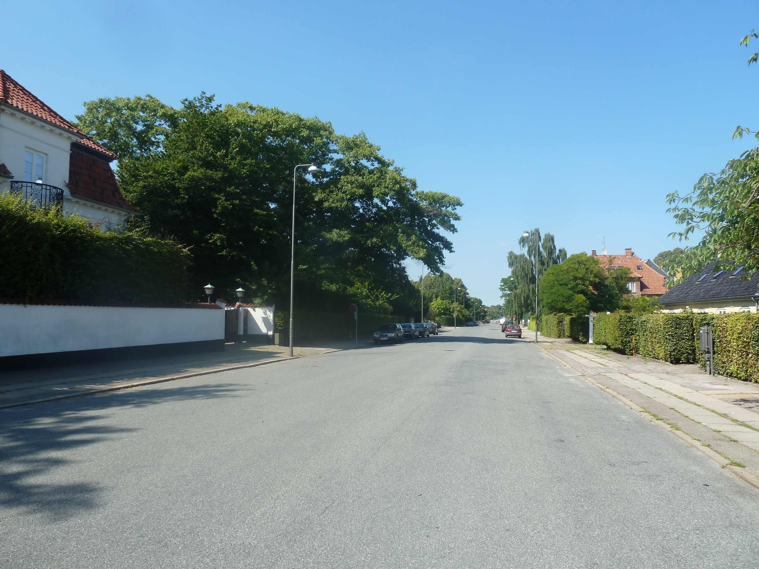 The street Svanemøllevej in Østerbro in Copenhagen.